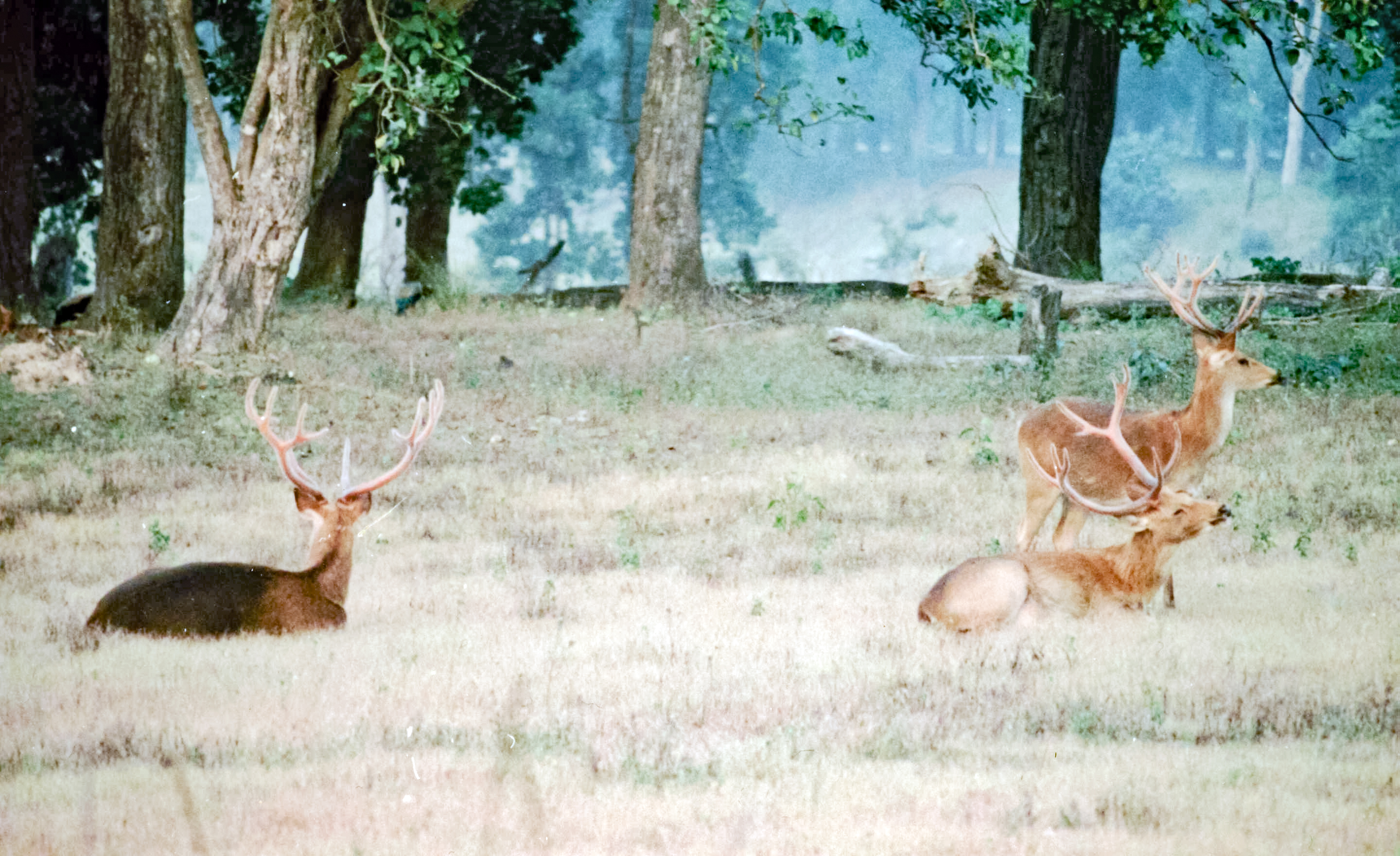 Hochlandbarasingha (Rucervus duvauceli branderi) at Kanha National Park